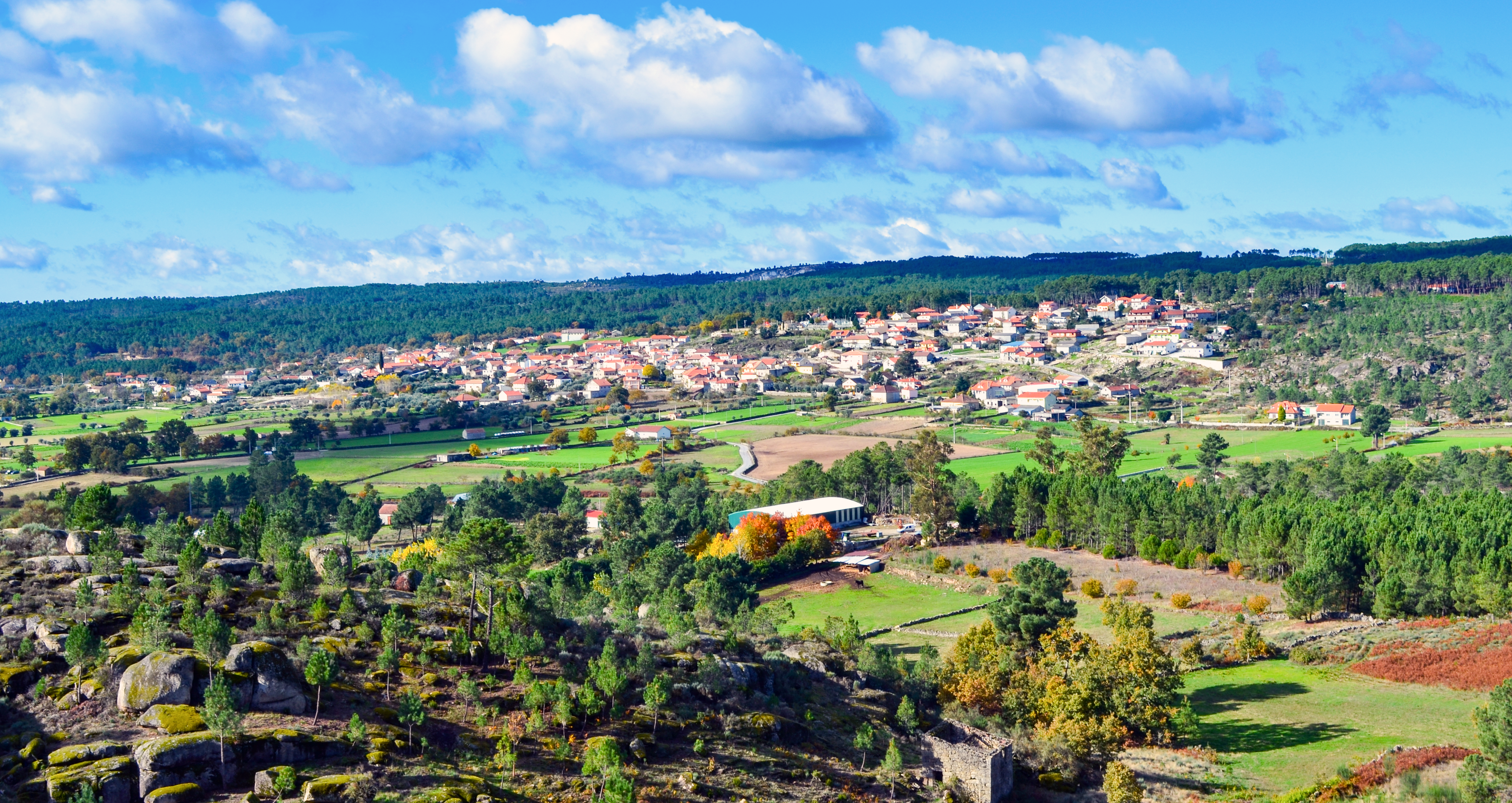 Esta é uma vista da freguesia de Carapito obtida a partir do Castro dos Castelos.